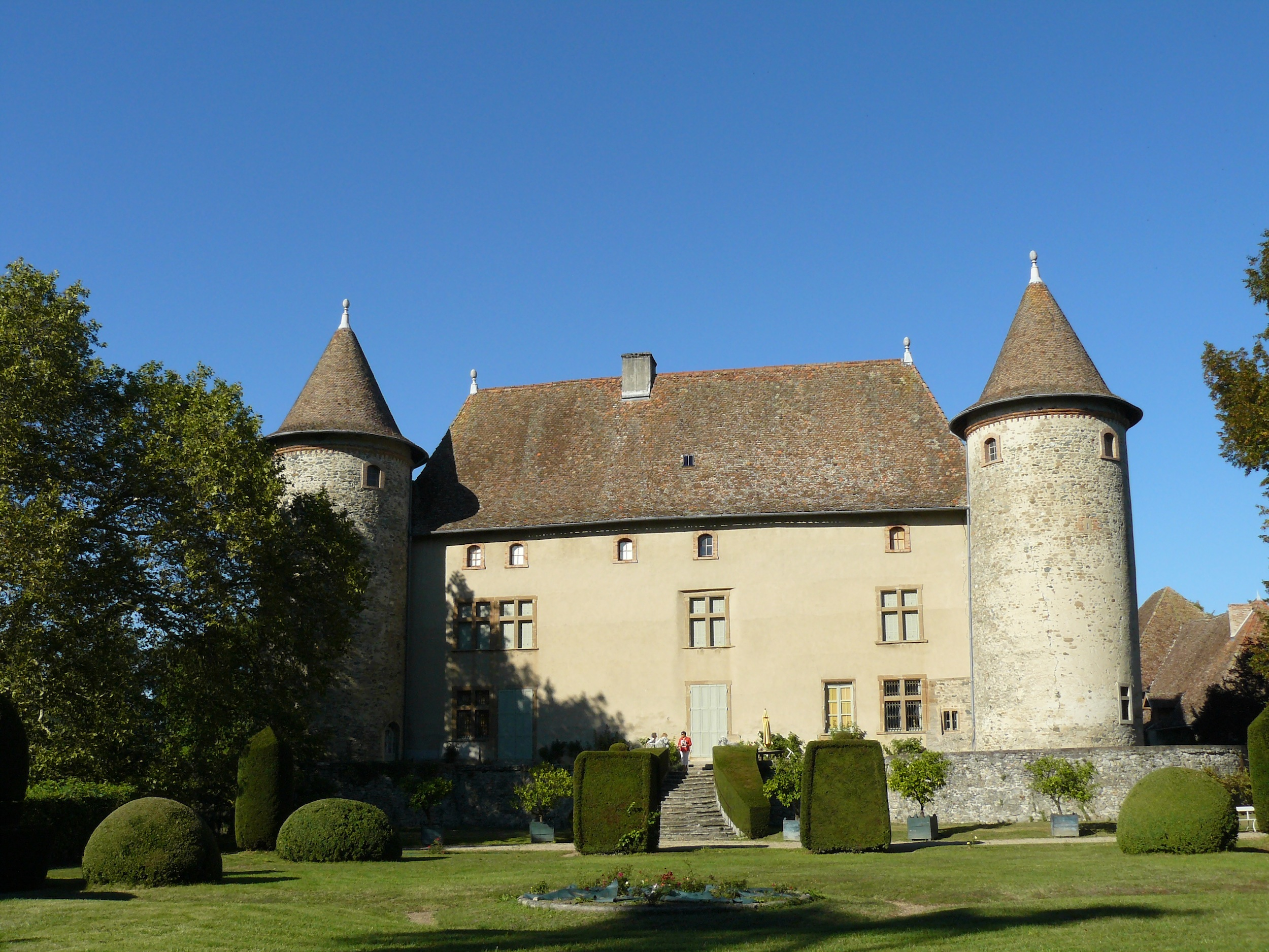 Façade sud et jardins du château de Cuirieu (XVIIe - XIXe) près de la Tour du Pin (St-Jean-de-Soudain)